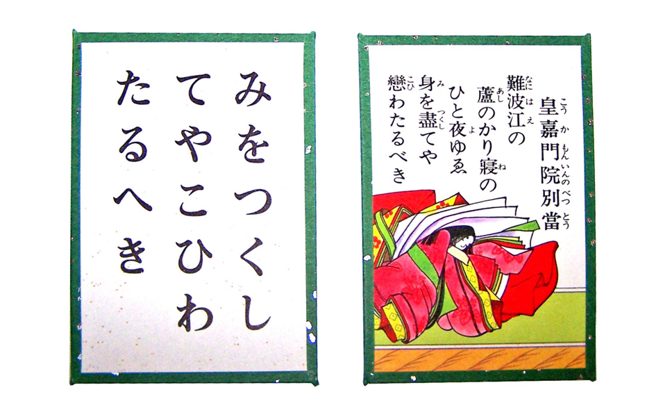 Cartes du jeu japonais karuta - Carte de kana et carte avec waka correspondant